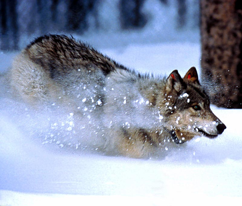 Wolf im Yellowstone Nationalpark, Winter